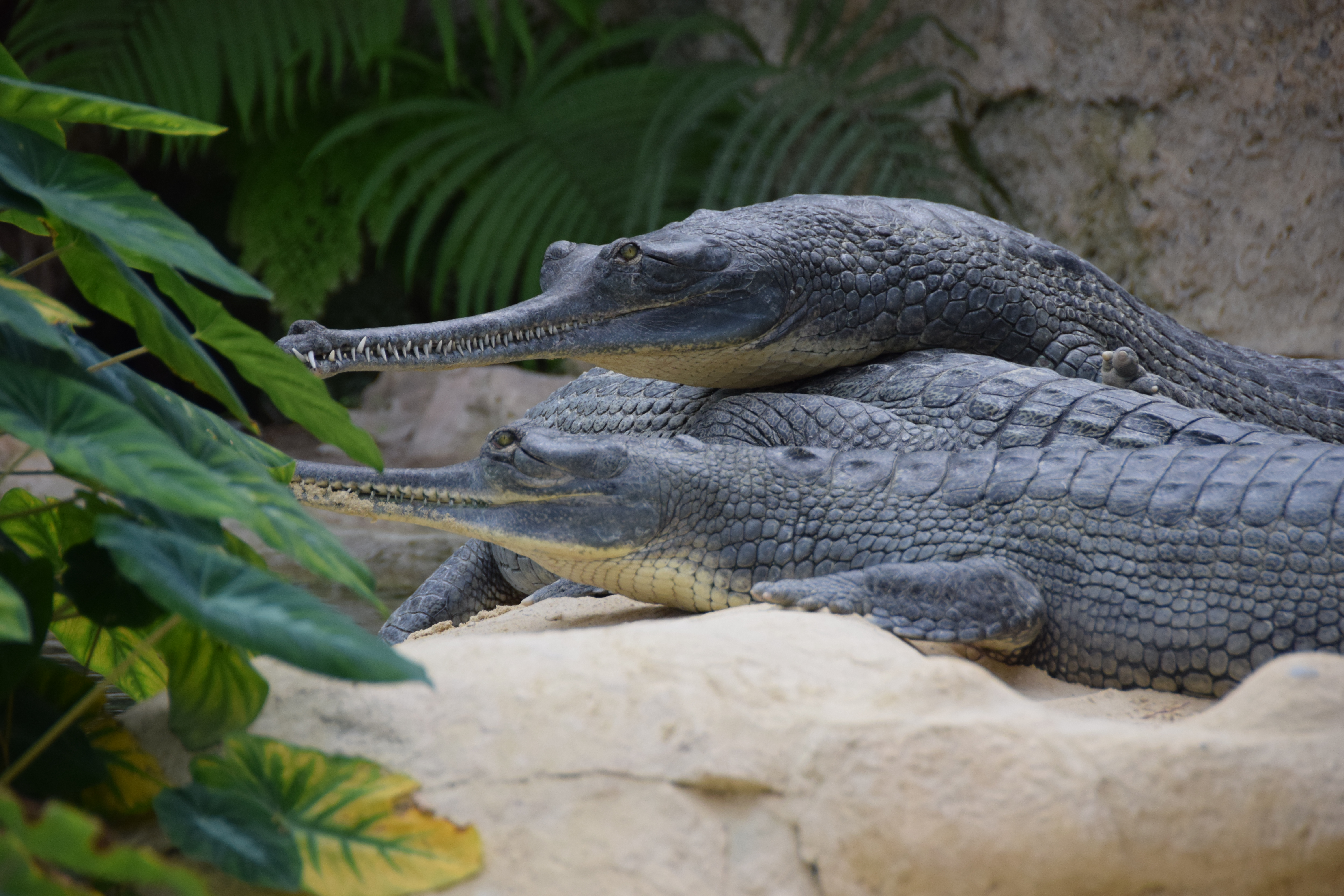 Gavial du Gange à la ferme aux crocodiles de Pierrelatte.